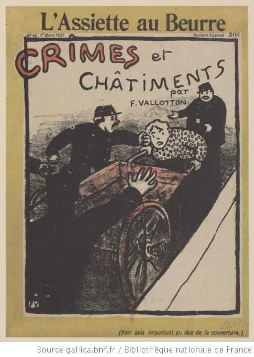 Couverture du Numéro 42 du 1er mars 1902.